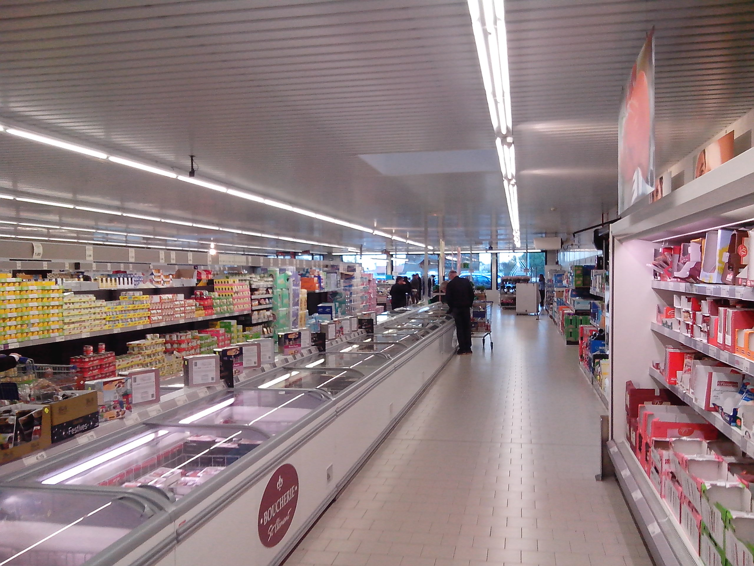 Supermarché Aldi à Arvert